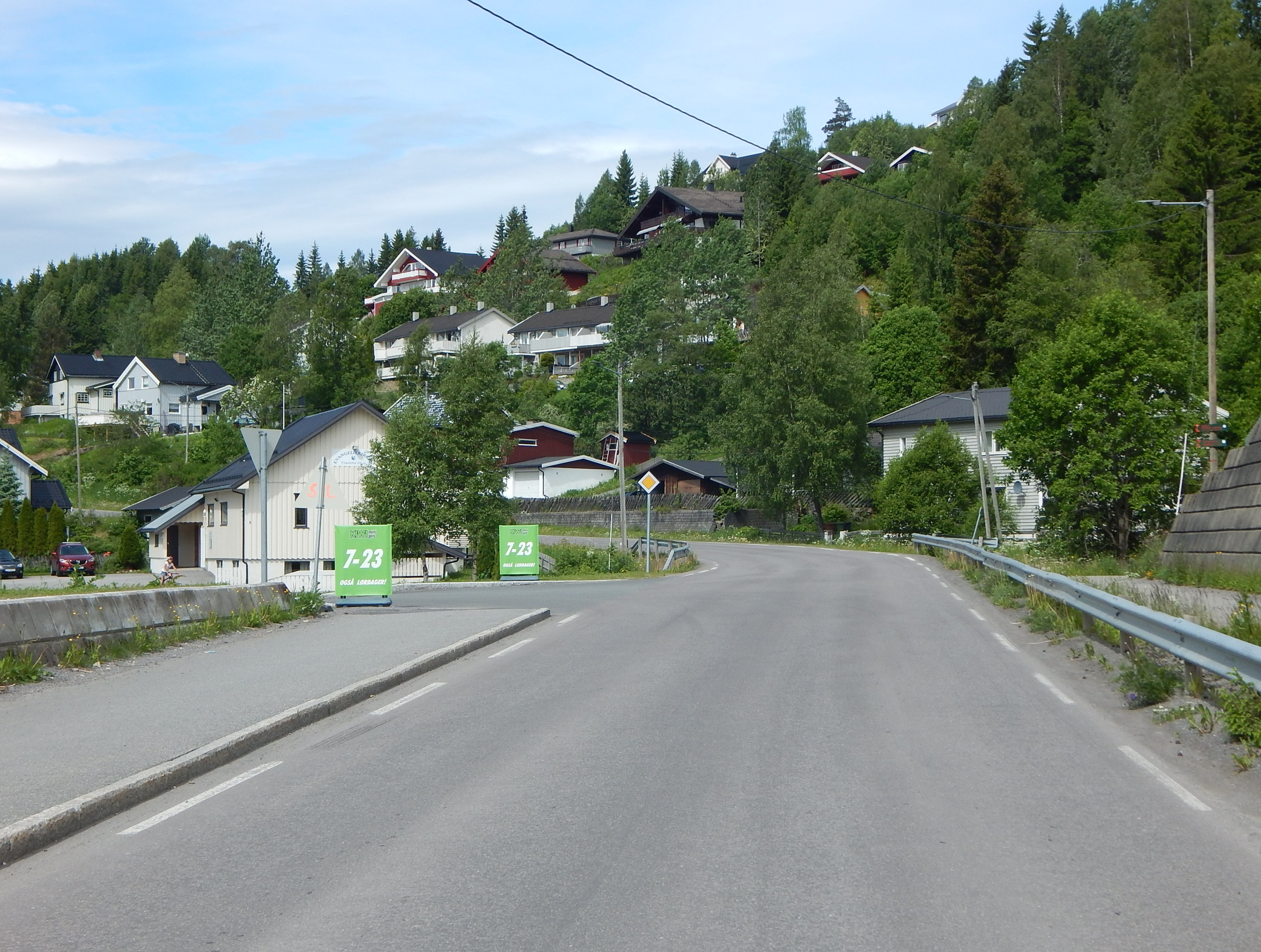 Myllavegen (fylkesvei 2284, tidl. FV12) i Grua